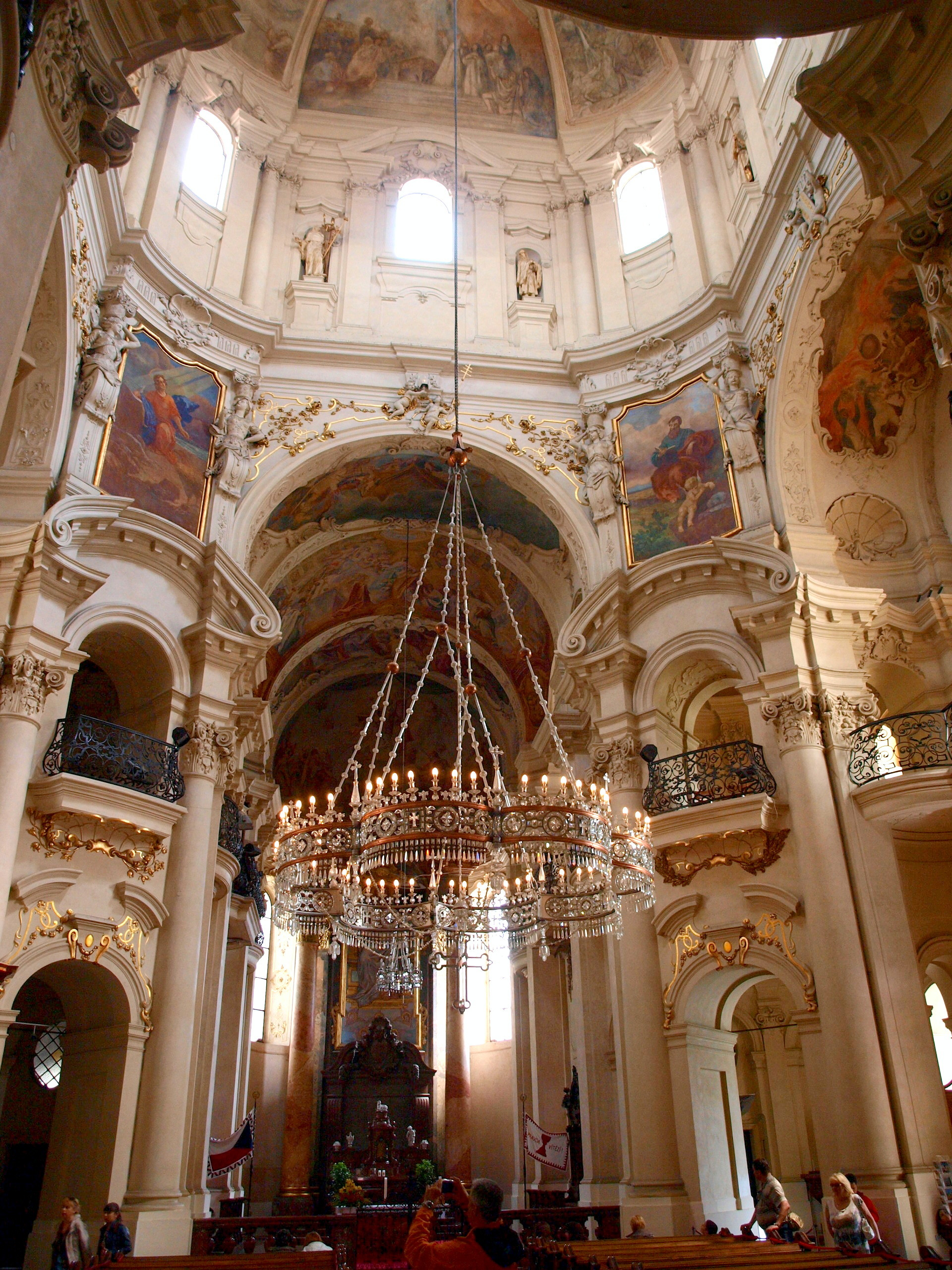 Chrám svatého Mikuláše na Starém Města pražském